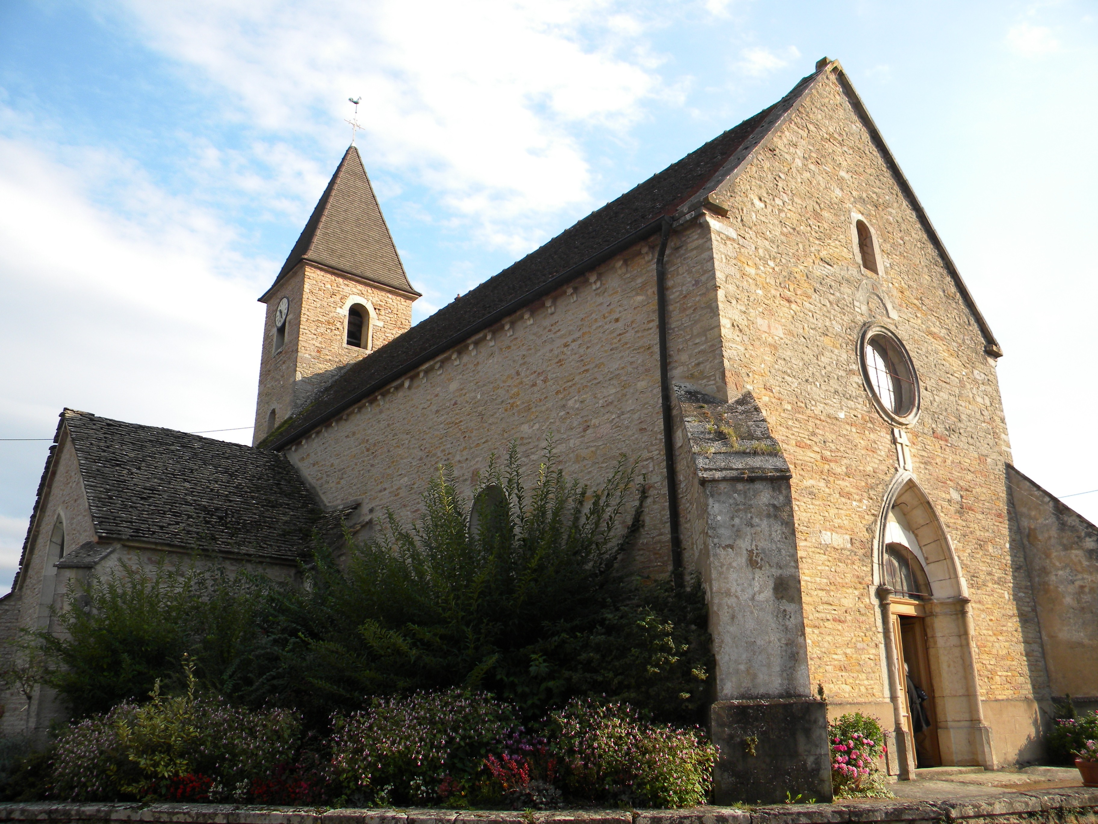 Eglise de Lalheue